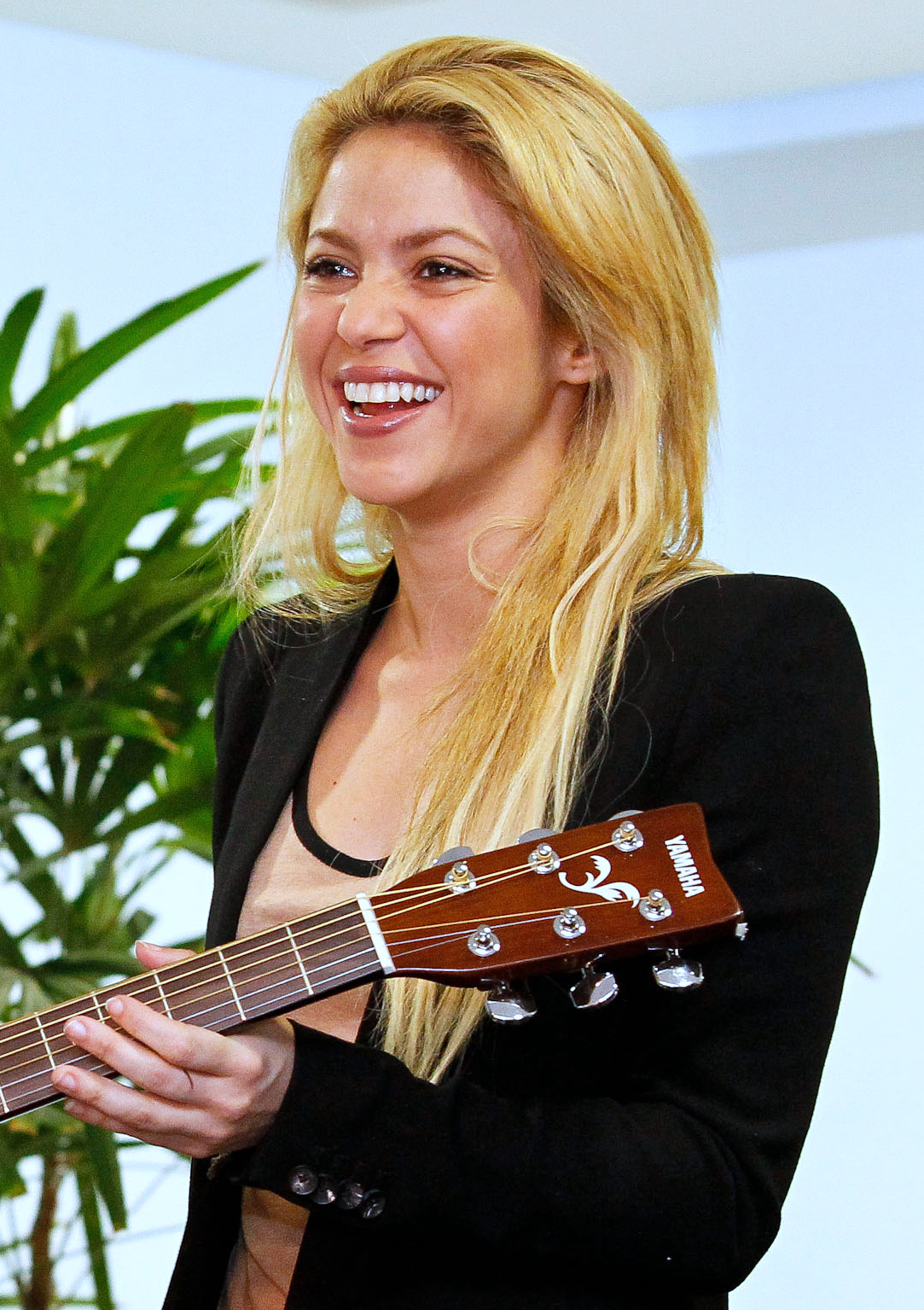 Rita mainardi nel 2030